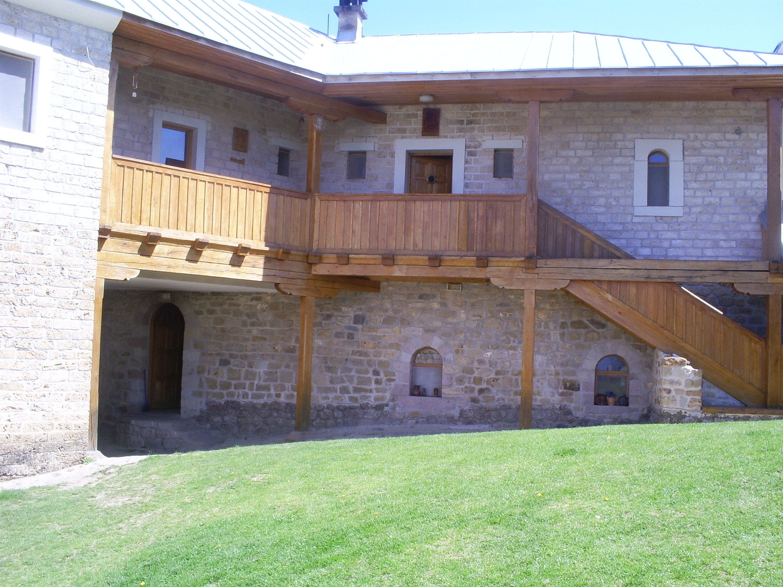 Manastir Djurdjevi stupovi - konak